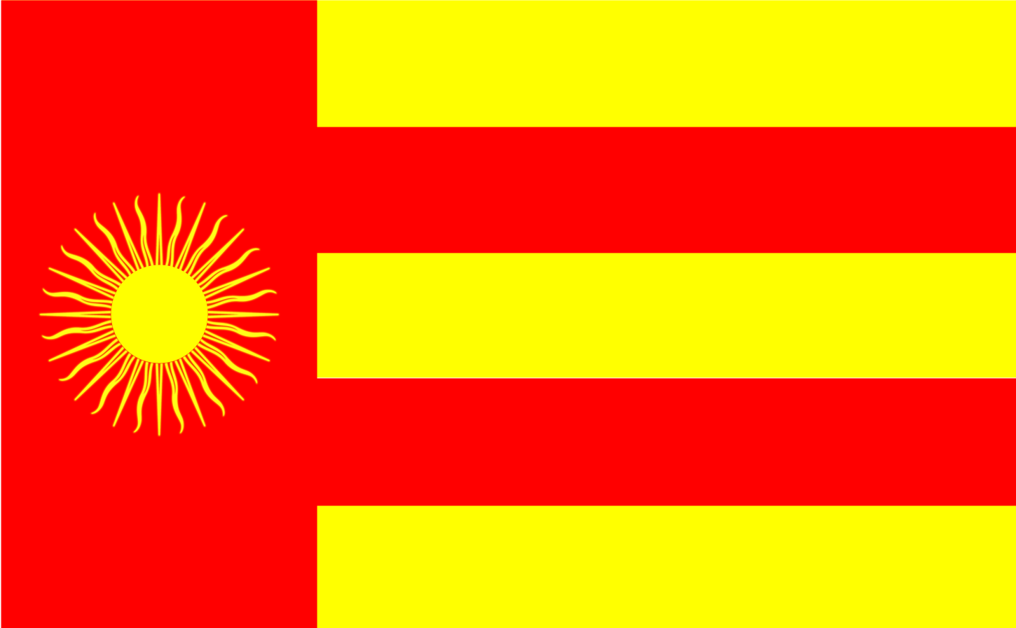 Propuesta de bandera para la región de Tarapacá